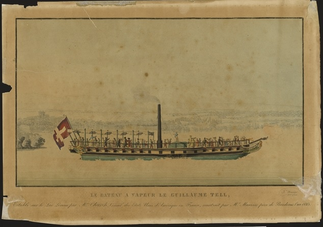 Gravure (eau-forte, sur papier) représentant le bateau à vapeur Guillaume Tell (1823-1836), sur le Léman, devant Genève. Collection Musée du Léman.